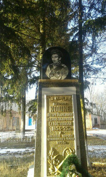 Жителі села встановили новий бюст герою Кримської війни.